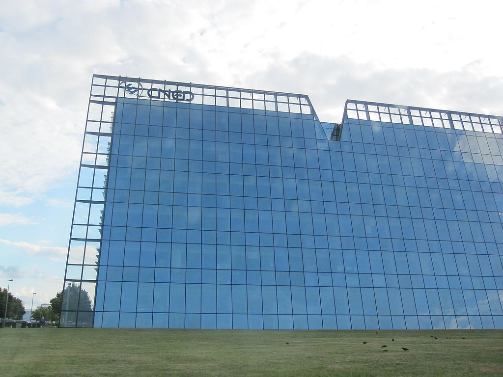 Fachada de la sede del Sede del Centre national d'enseignement à distance